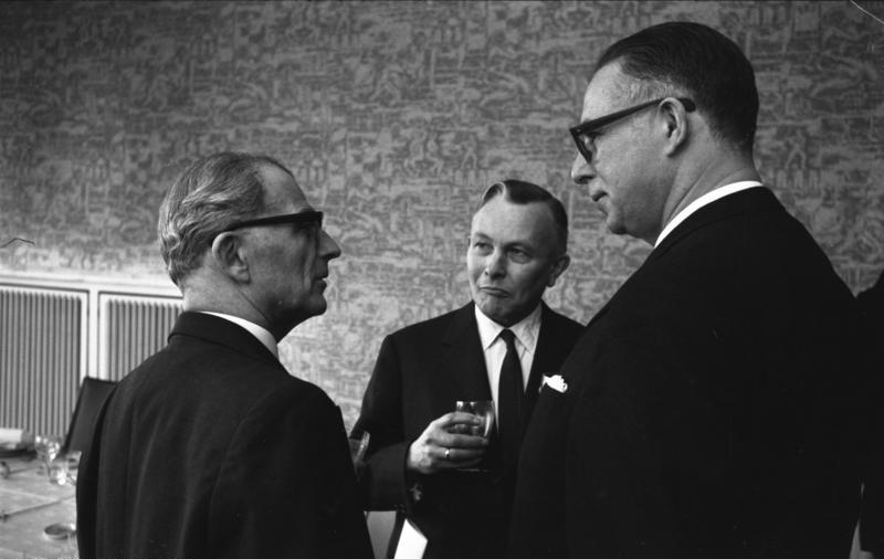 BM Bucher empfängt brasilianische Gäste im Königshof (hier im Bild: Ministerialdirektor Dr. Joel, Ministerialdirigent Knolle, Prof. Meyer-Lindenberg)